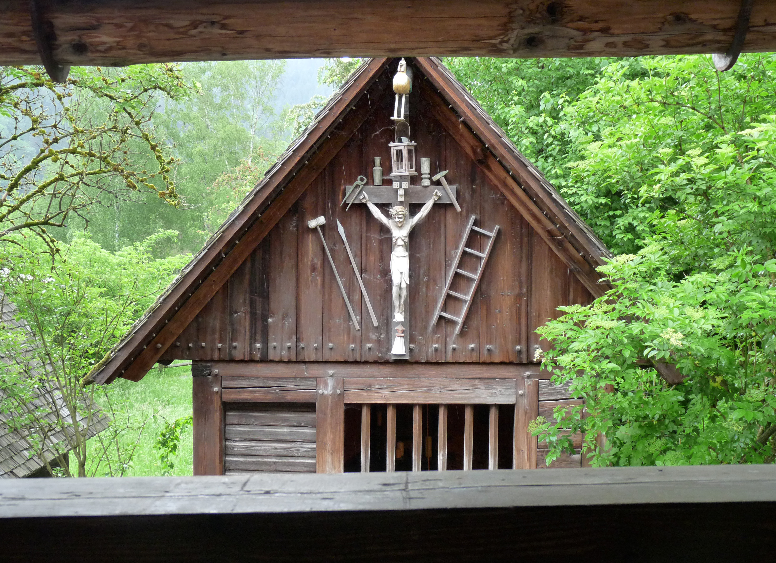 Chapelle construite en 1737, au musée de plein air Vogtsbauernhof (Gutach)